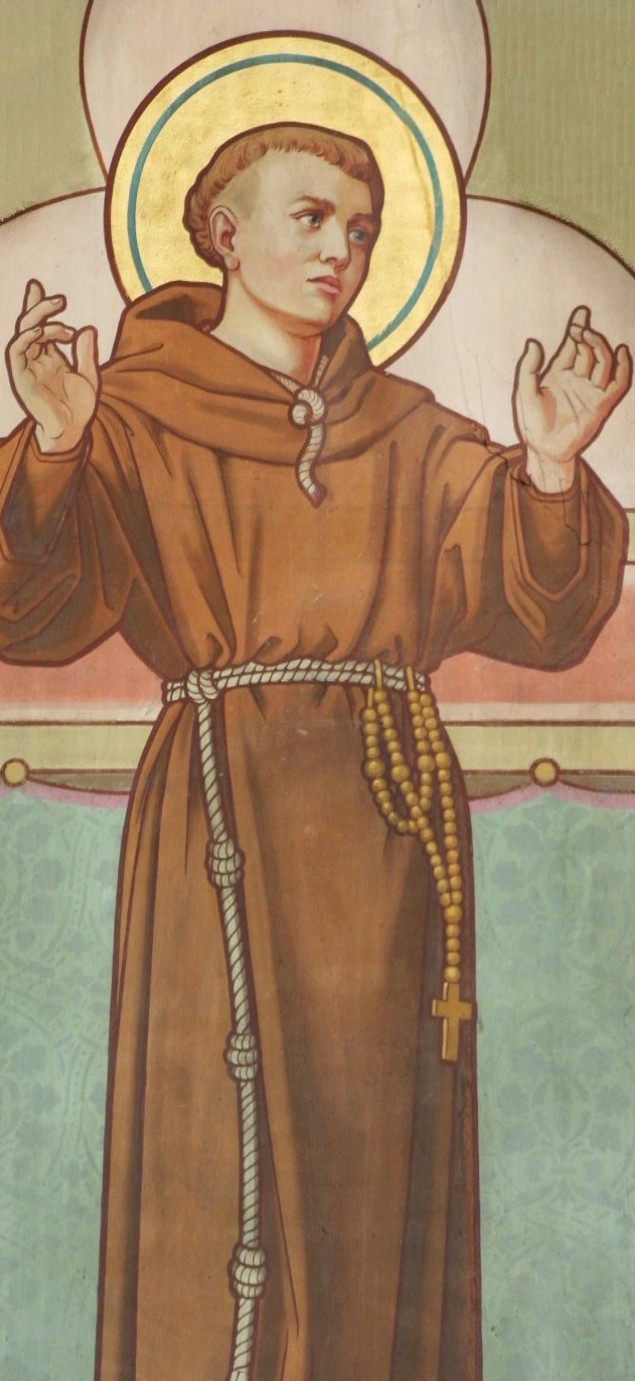 St. Antonius van Weert, martelaar van Gorcum.